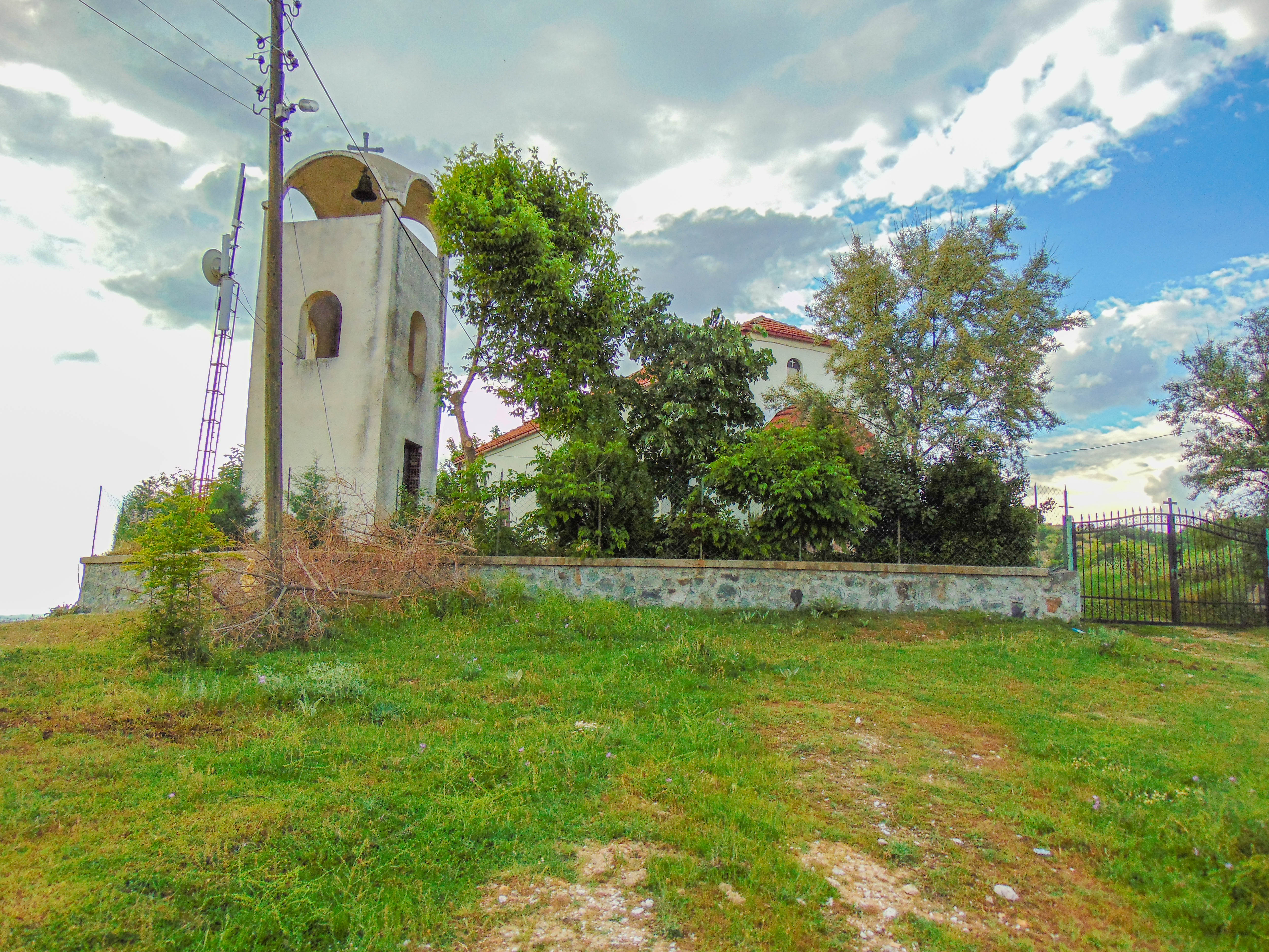 Црква „Св. Архангел Михаил“ - Јаргулица